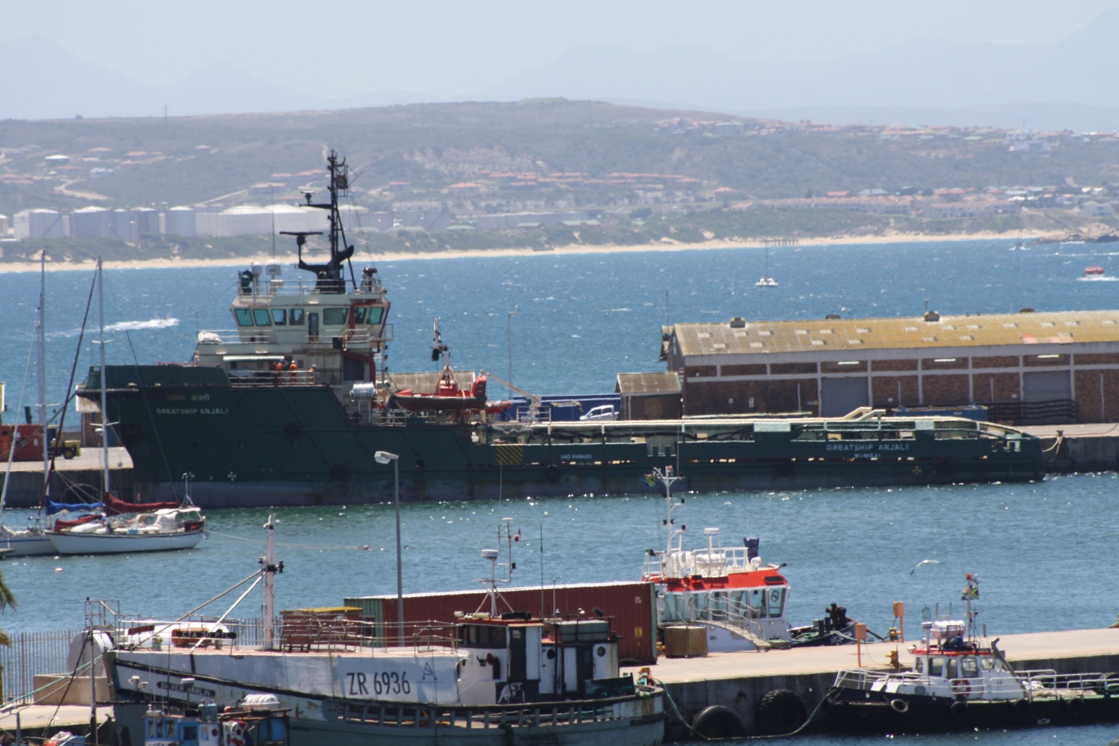 Greatship Anjali IMO 9408425